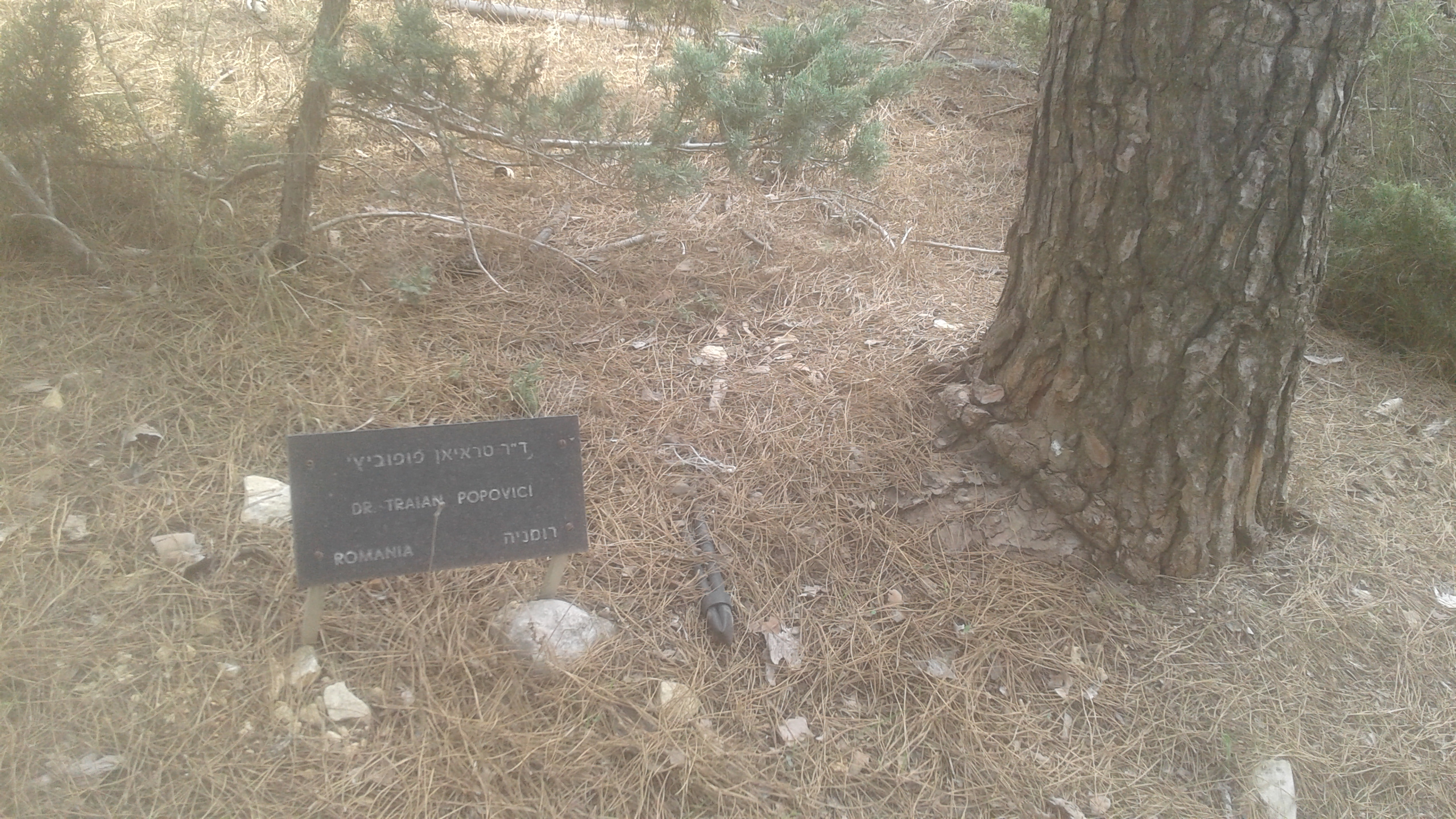 העץ שניטע ביד ושם לזכר חסיד אומות העולם טראיאן פופוביץ'